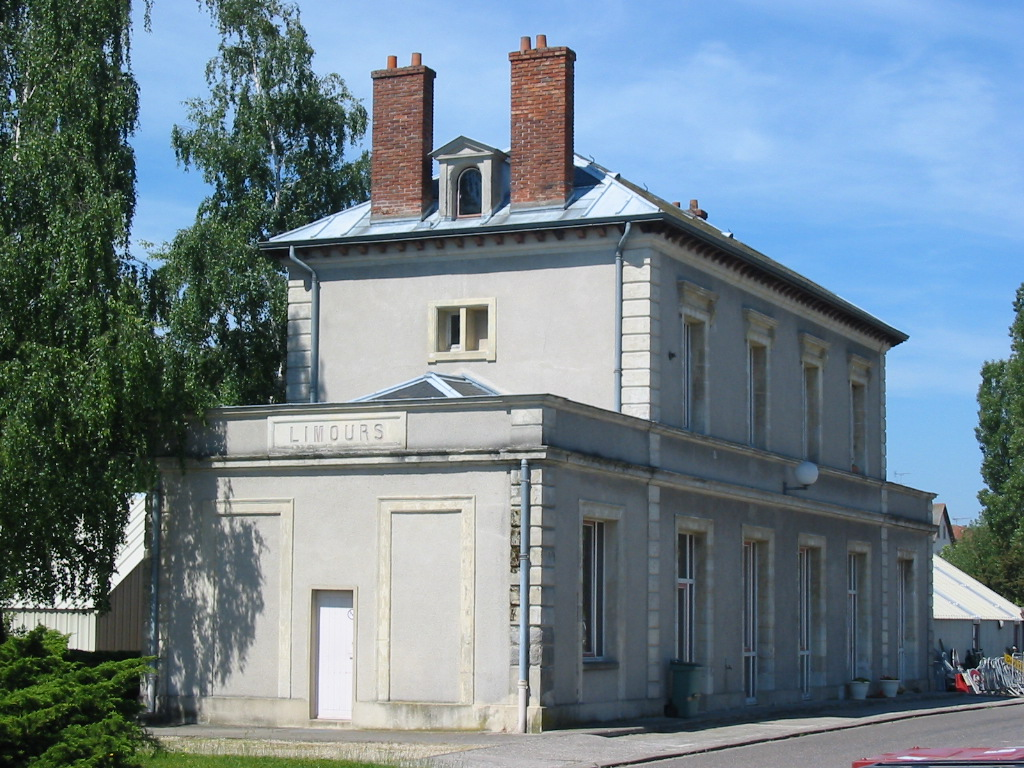 Gare de limours, ancien terminus de la ligne de Sceaux